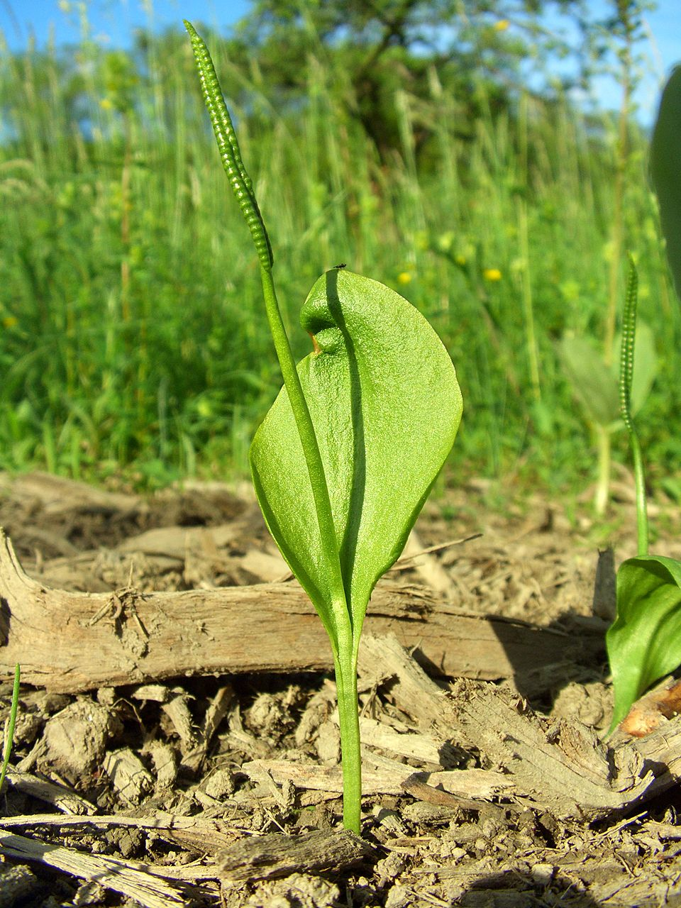 Ophioglossum vulgatum - plant